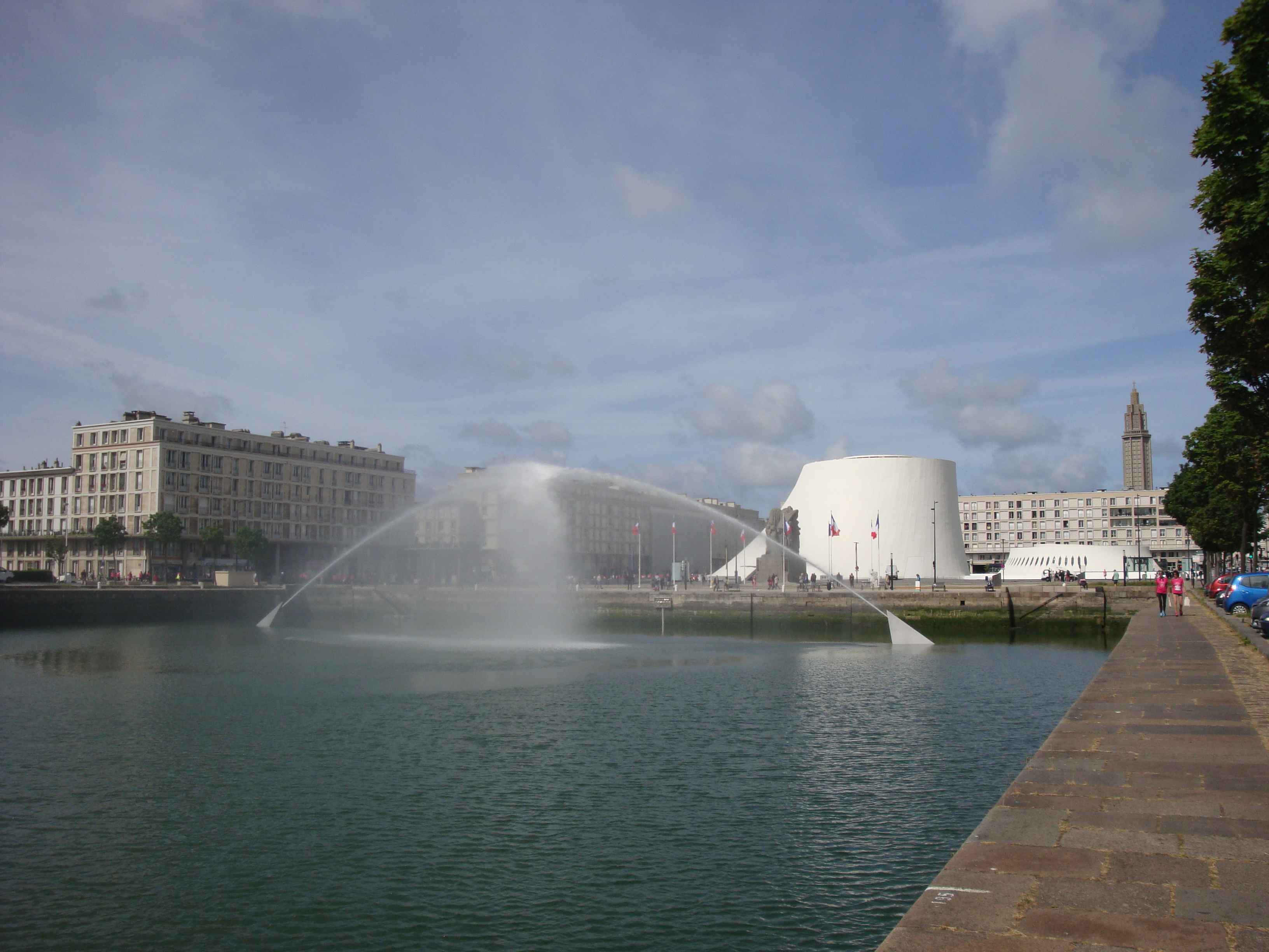 Vue du bassin du Commerce, le Volcan au fond le clocher de l'église St Joseph avec l'installation "impact" de Stéphane Thidet au second plan pour les 500 ans de la ville.